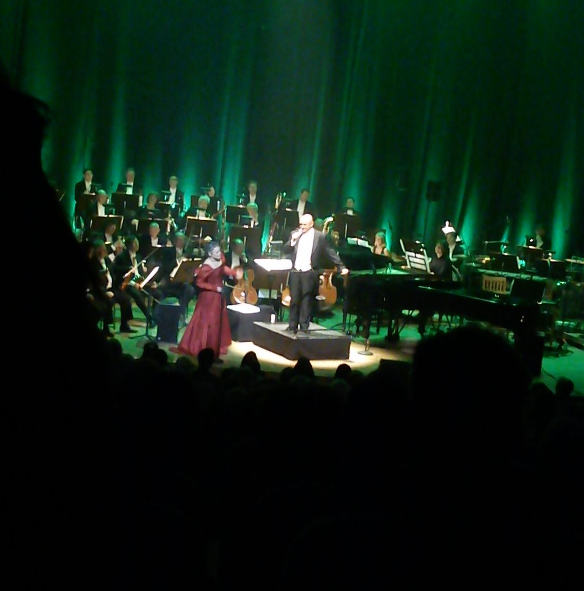 Dirigenten Hans Ek och sopranen Maria Keohane.